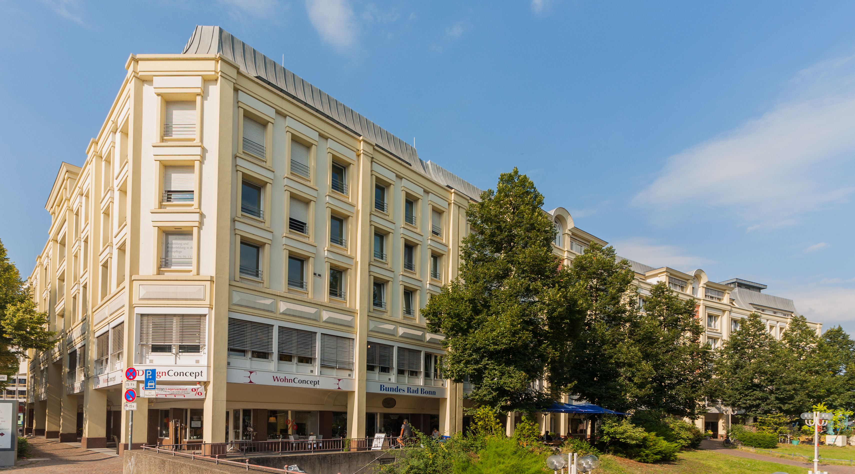 Theaterarkaden, Belderberg 3–9, Kapuzinerstraße 1–15, Bonn-Zentrum